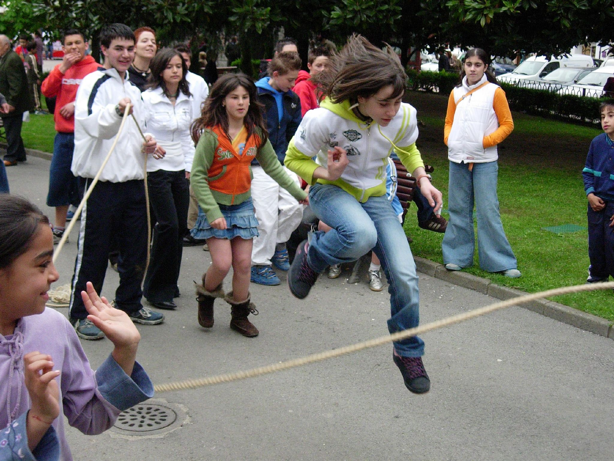 Soka saltoan jolasten